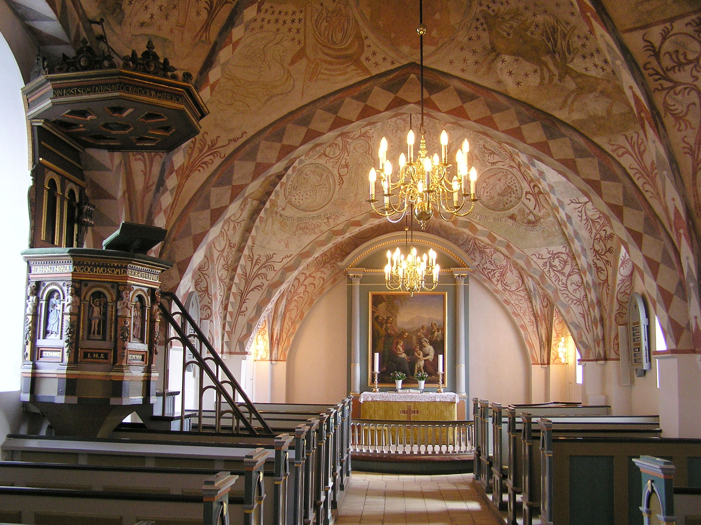 Prædikestol i Højelse Kirke, Ll. Skensved. Prædikestolen bærer årstallet 1595